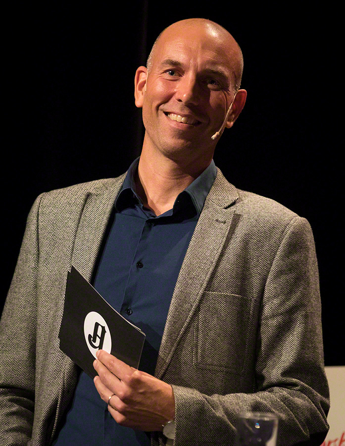 Debatt om innvandring som markerte åpningen av Forskningsdagene 2016. Arrangementet var på Edderkoppen på Scandic St. Olavs plass den 21. september 2016. Deltakere: Anne Britt Djuve (Fafo) Knut Røed (Frischsenteret) Erling Holmøy (SSB) Thomas Hegghammer (FFI) Hanne Caroline S. Iversen (JD) Svein Oppegaard (NHO) Tor-Arne Solbakken (LO) Tino Sanandaji Andreas C. Halse (Sv) Heidi Nordby Lunde (H) Sylo Taraku (Agenda) Ordstyrere: Erik Tornes Mina Hauge Nærland